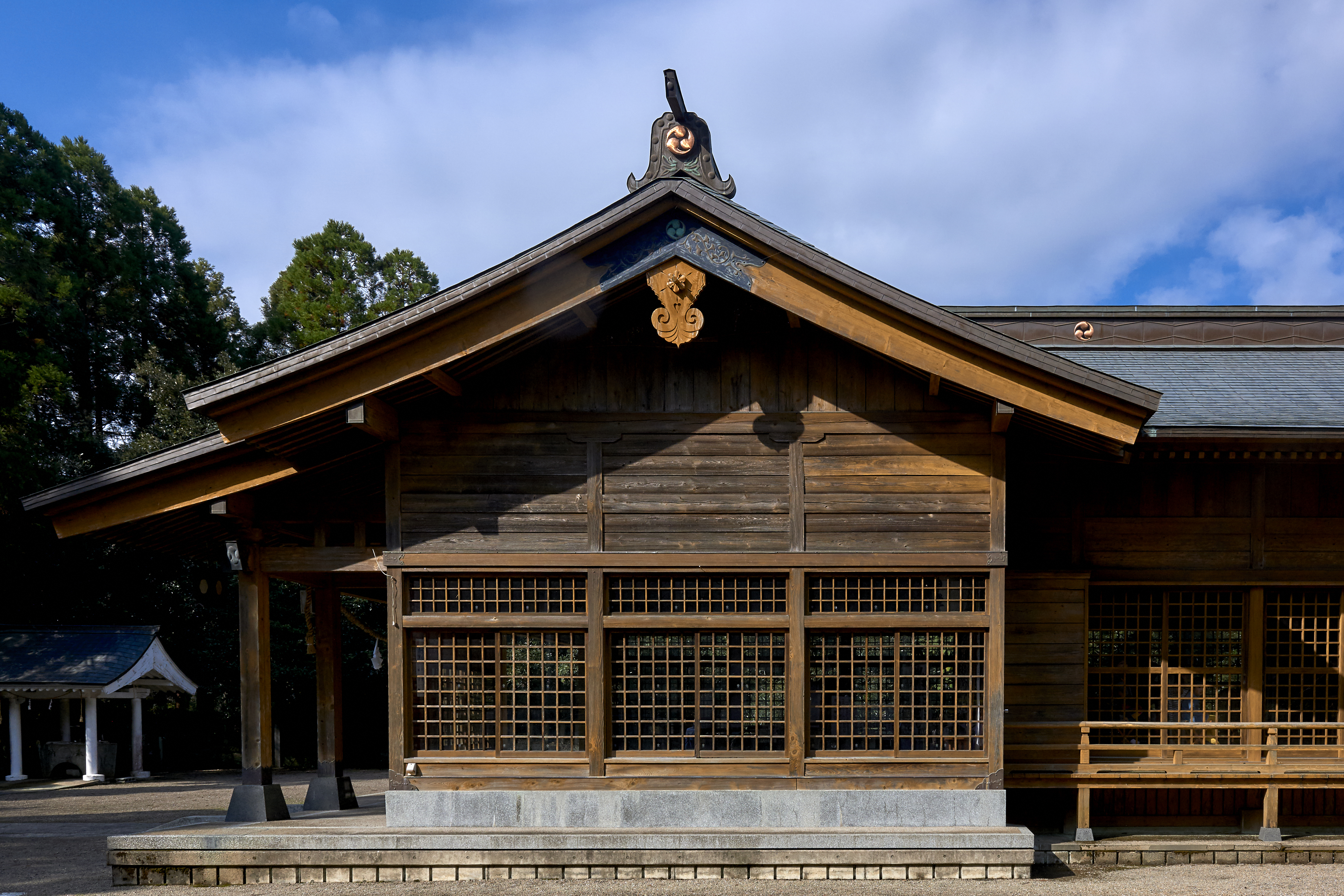 串間神社拝殿の側面